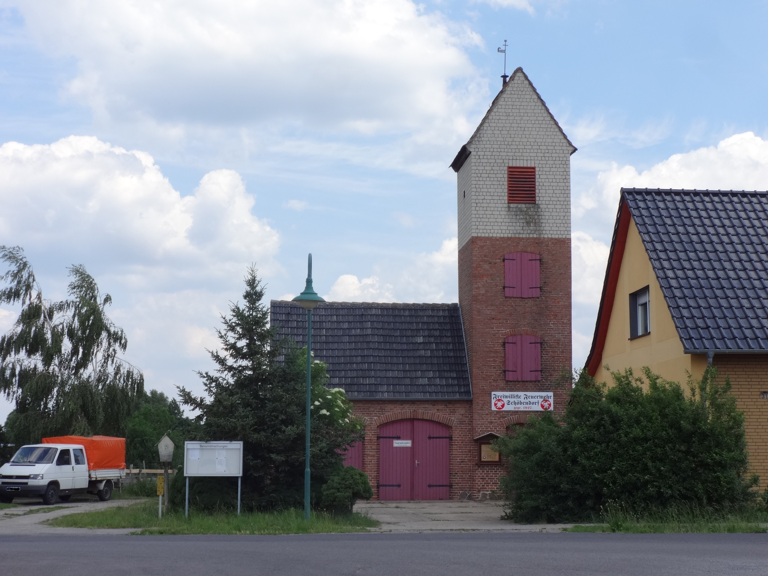 Freiwillige Feuerwehr in Schöbendorf, ein Ortsteil von Baruth/Mark im Landkreis Teltow-Fläming in Brandenburg